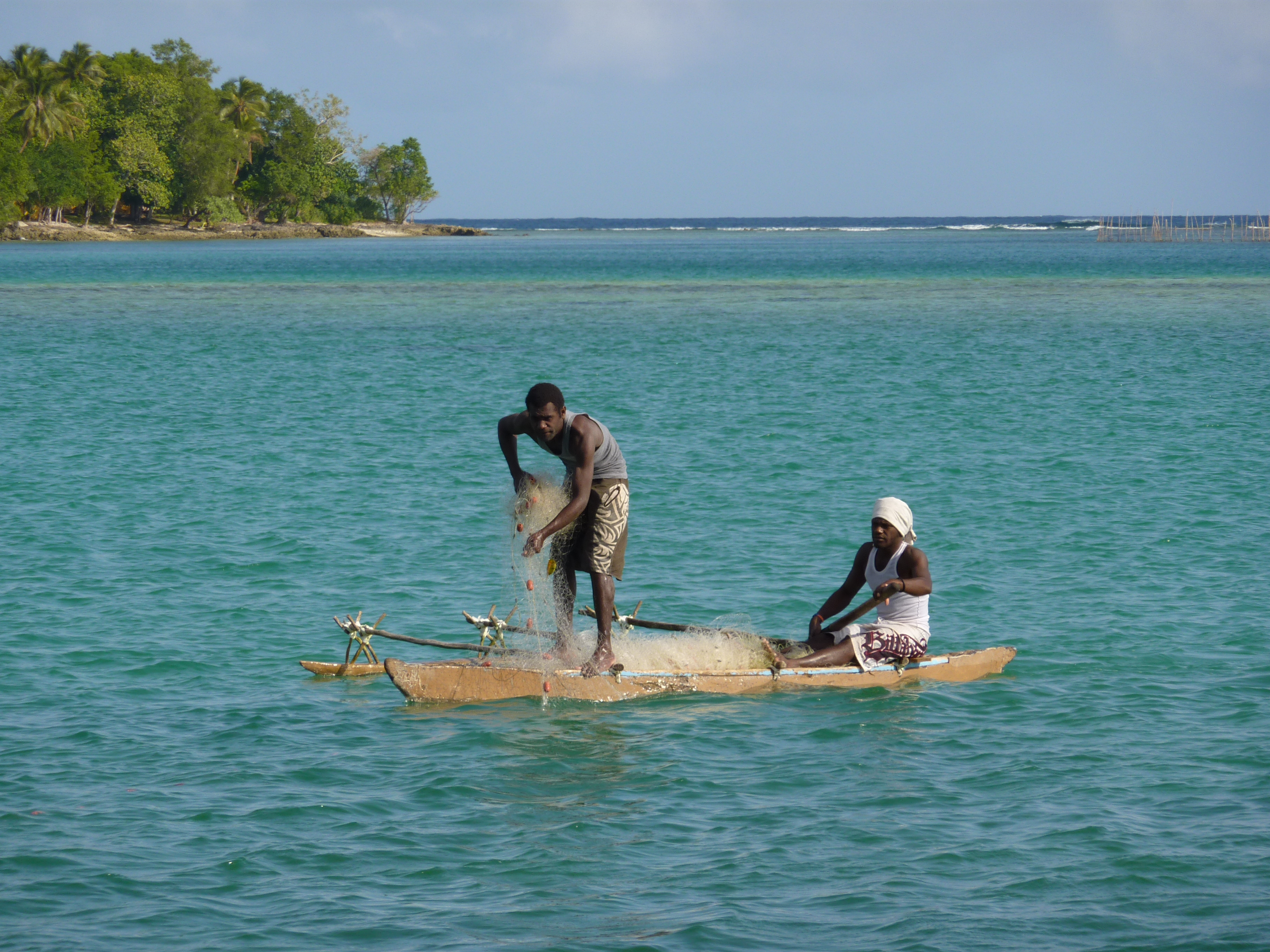 Fishing in Port Vila lagoon, Vanuatu 2009.